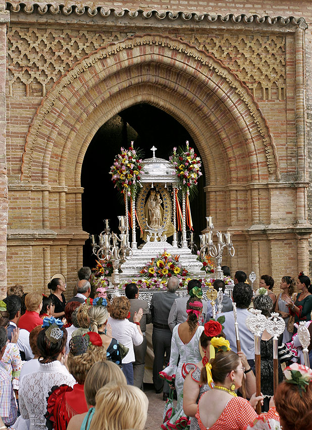 Ntra. Señora de los Milagros, patrona de Palos de la Frontera. (Salida hacia la Romería).